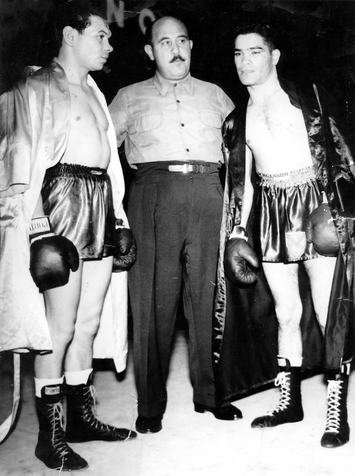 Combate entre los boxeadores argentinos Ángel Leyes y Ricardo González, Estadio Luna Park, Buenos Aires, 1952.